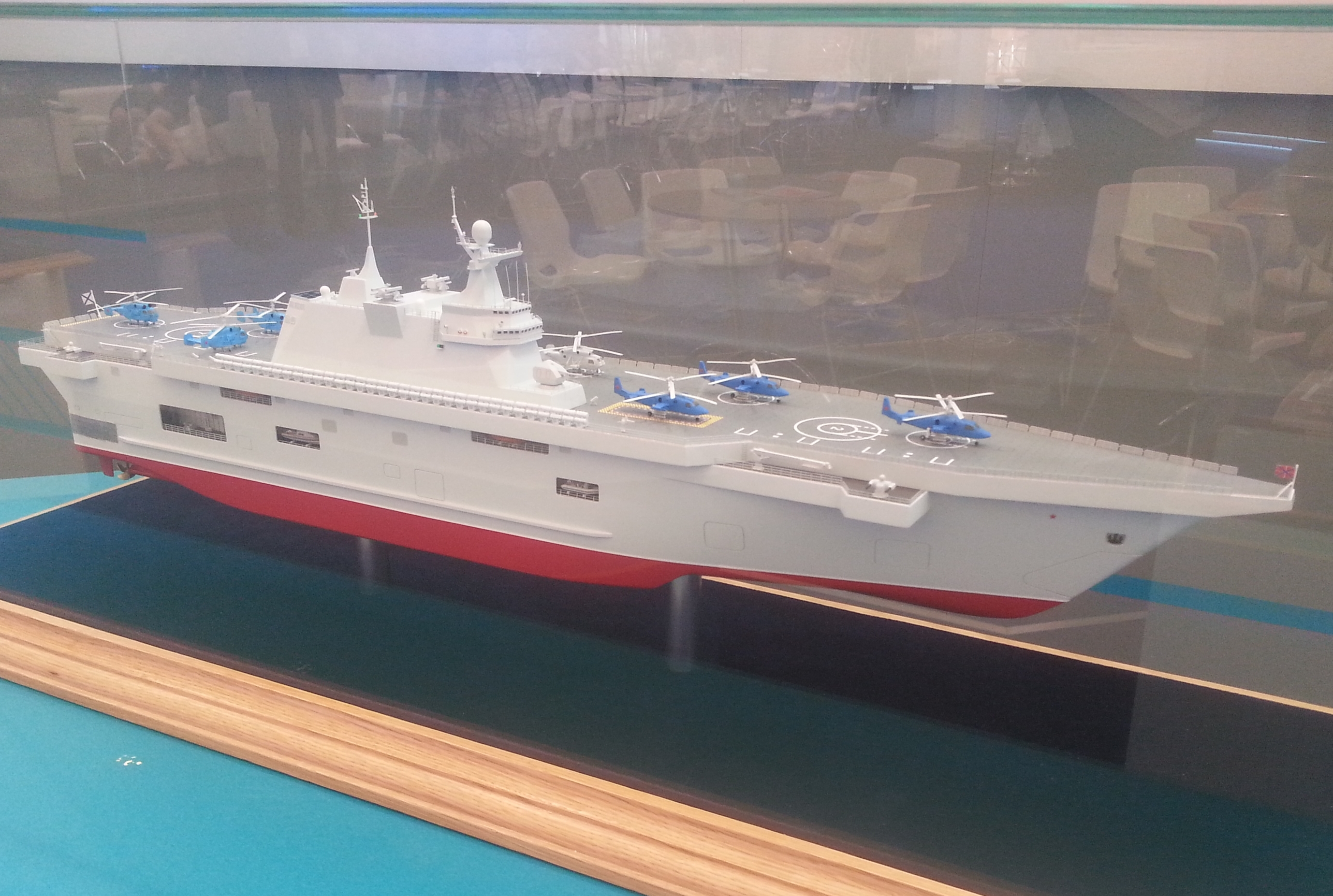 Десантный корабль типа «Прибой» на выставке «Армия 2015»